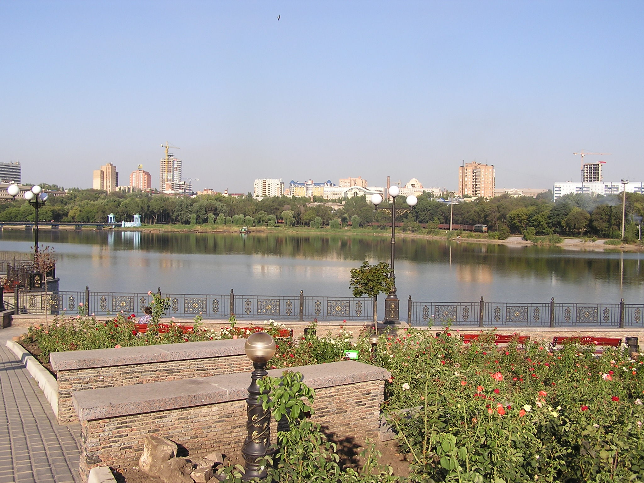 Парк Щербакова в Донецке